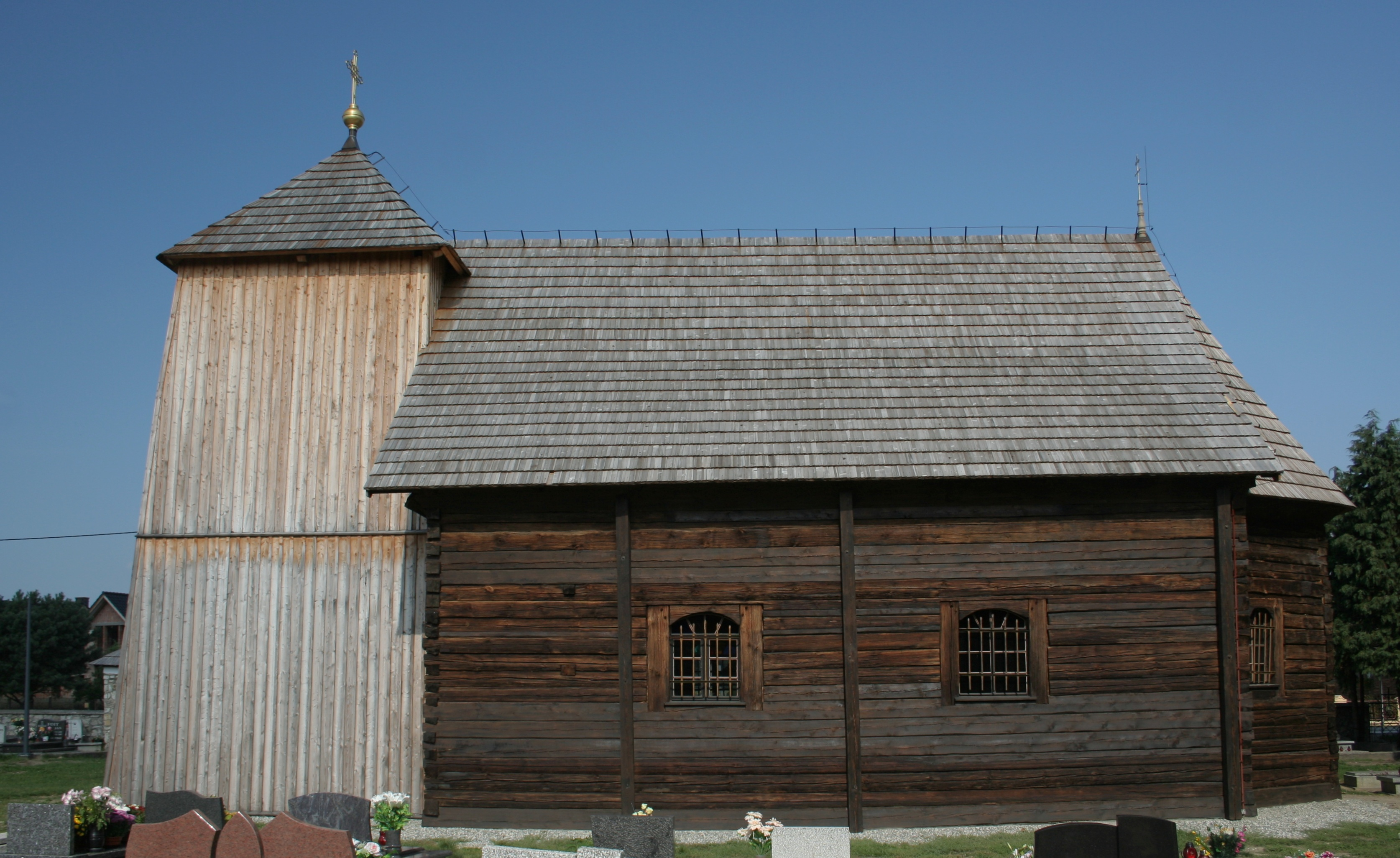 Kościół św. Bartłomieja w Smolnicy, woj. śląskie